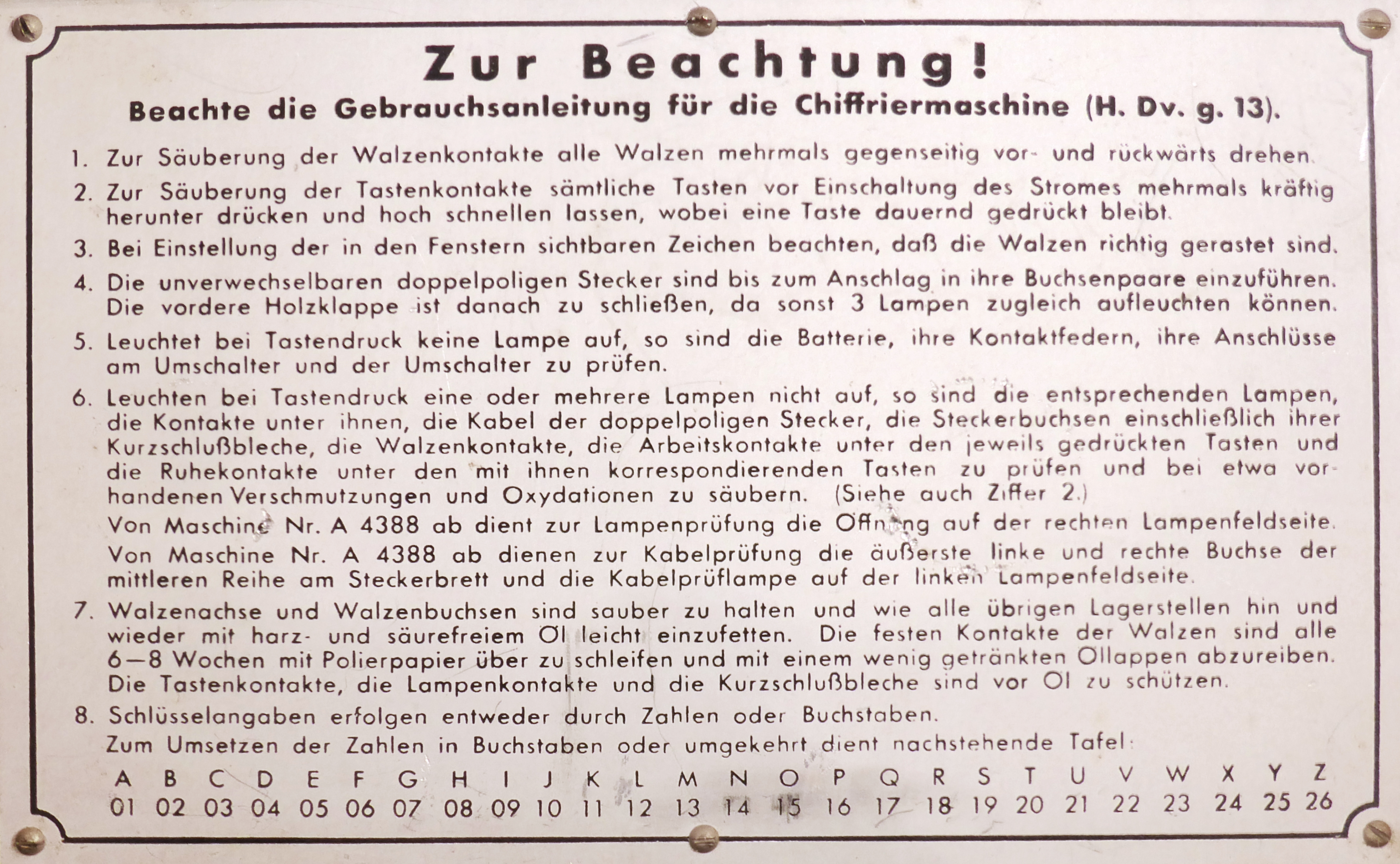 Enigma Chiffriermaschine im Deutschen Technikmuseum in Berlin. Wikipedianische KulTour am 10. Oktober 2015 in der Ausstellung des Museums.